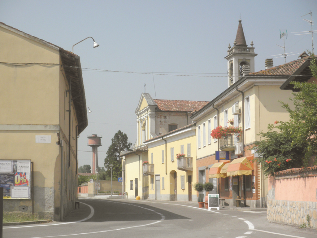 Panorama di Mairago, con via Agostino Bassi, parte della strada provinciale n. 191.